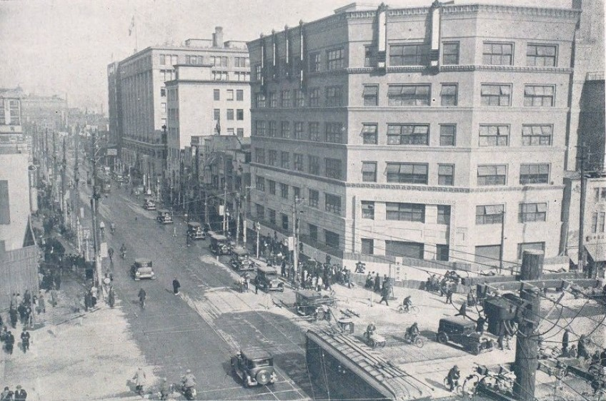 銀座尾張町 銀座四丁目交差点